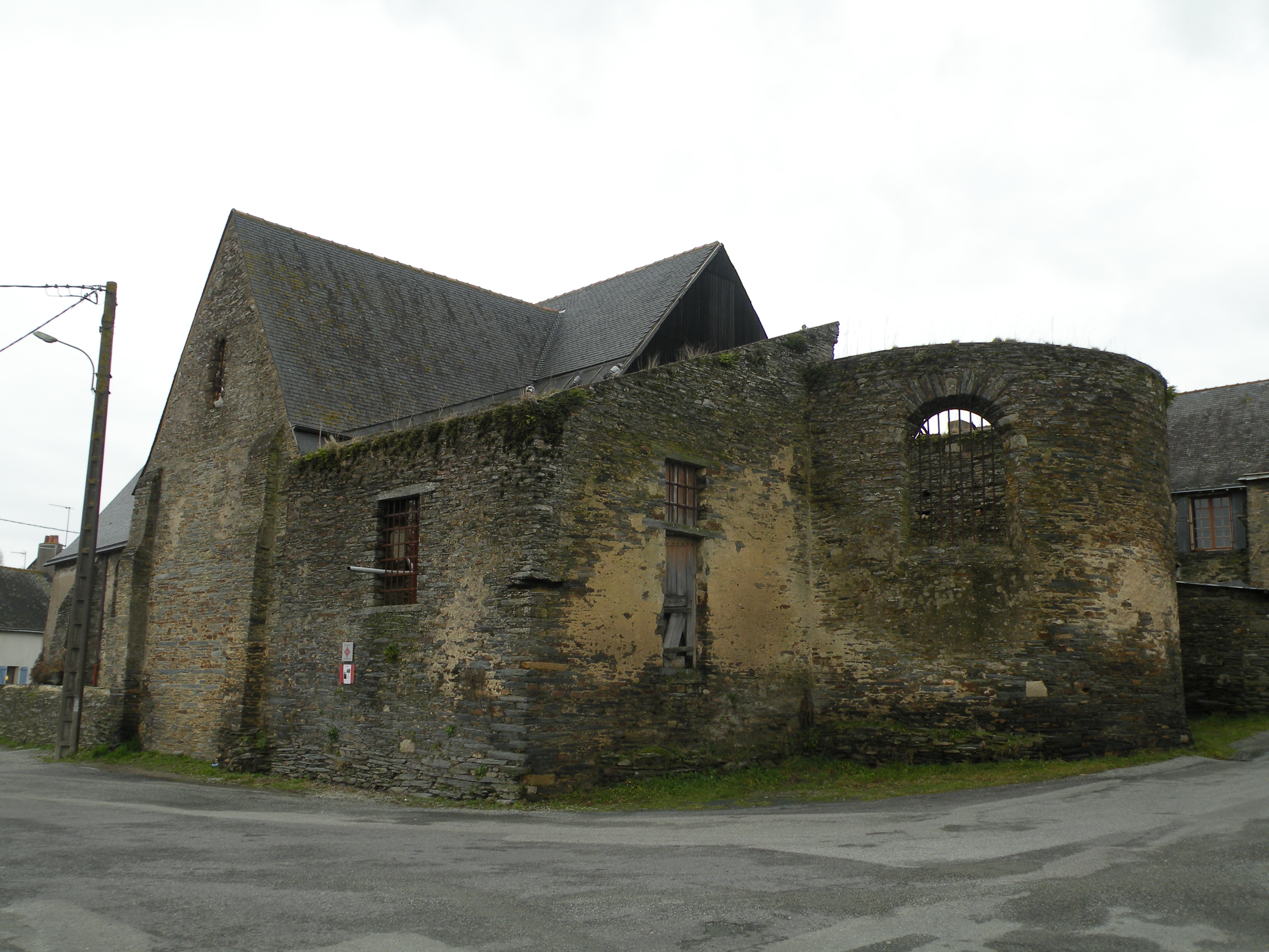 Chevet de l’ancienne église Saint-Saturnin-du-Vieux-Bourg à Nozay.